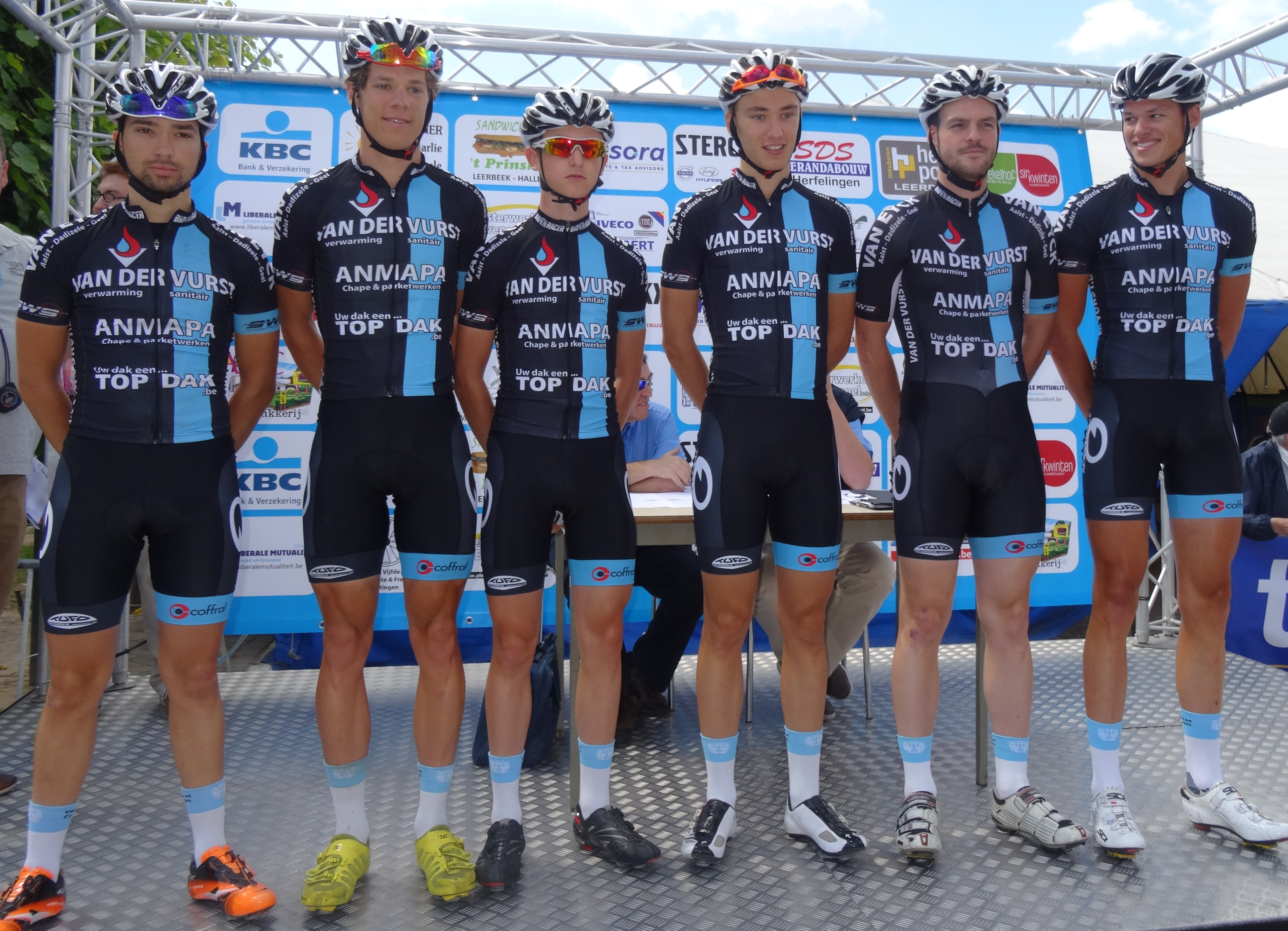 Reportage photographique réalisé le mercredi 25 juin à l'occasion du départ et de l'arrivée de l'Internationale Wielertrofee Jong Maar Moedig 2014 à Oetingen (Gooik), Belgique.